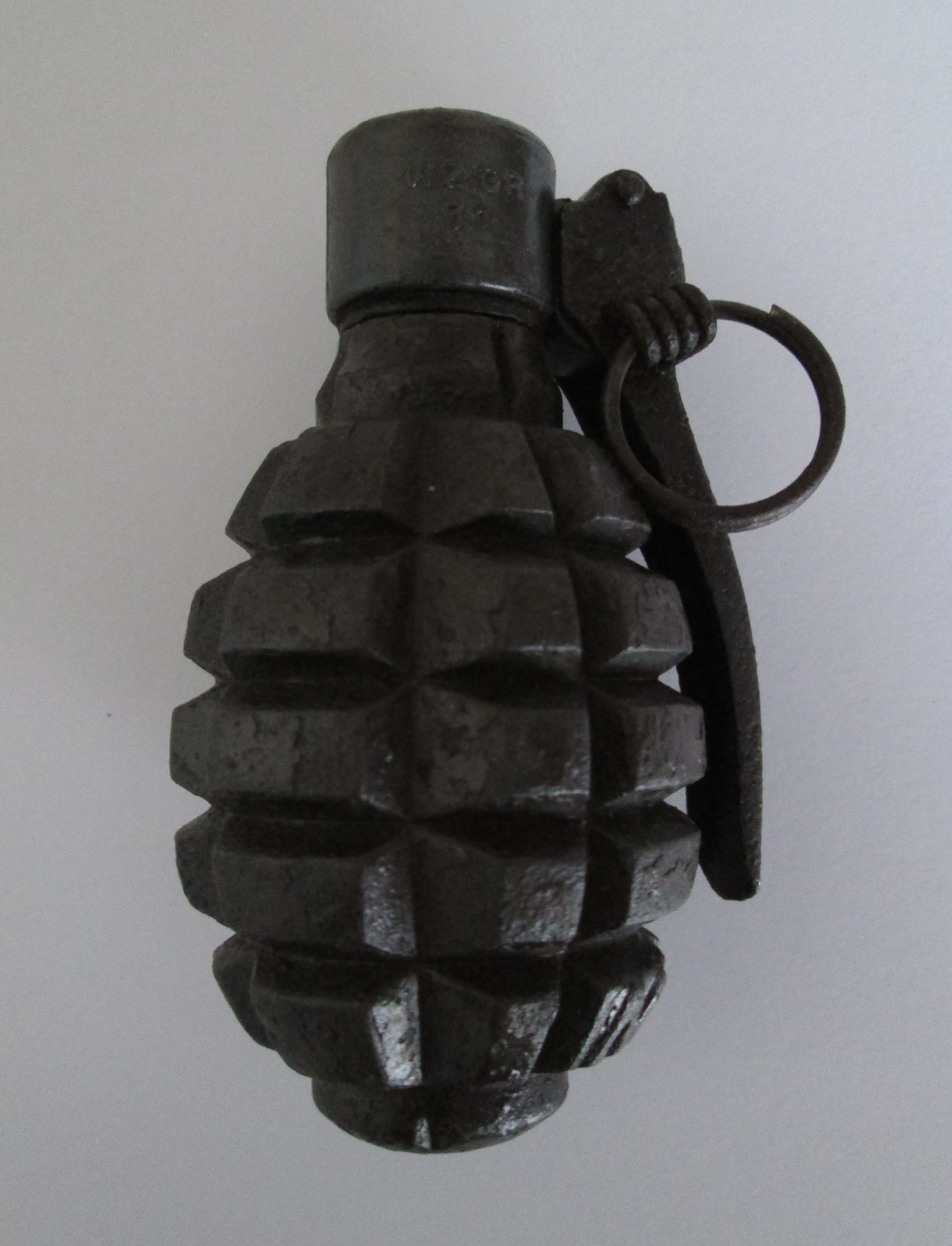 Granada de mano polaca WZ. GR. 31 de la Guerra Civil Española, importadas por el bando republicano en 1936.